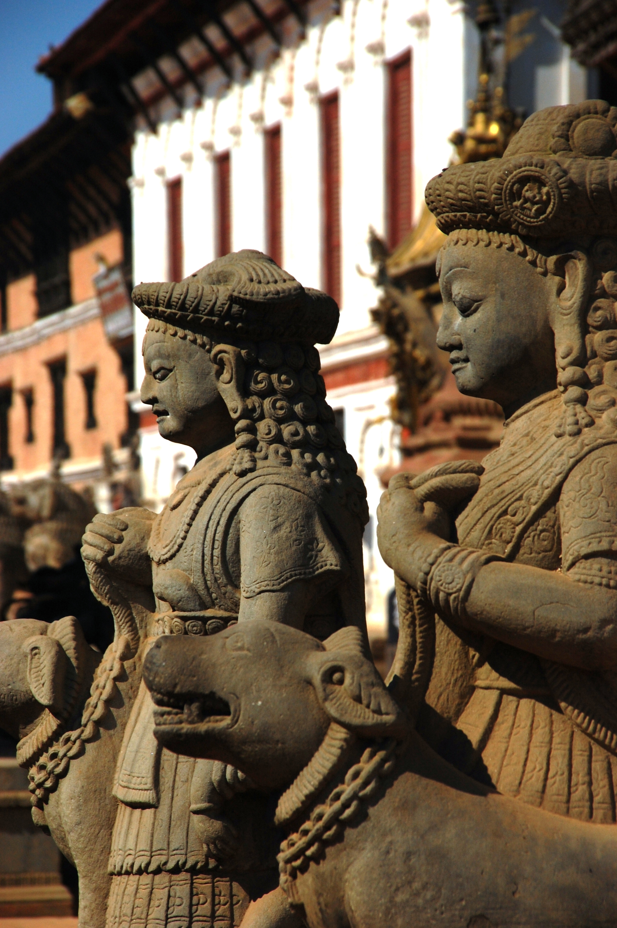 bakthapur